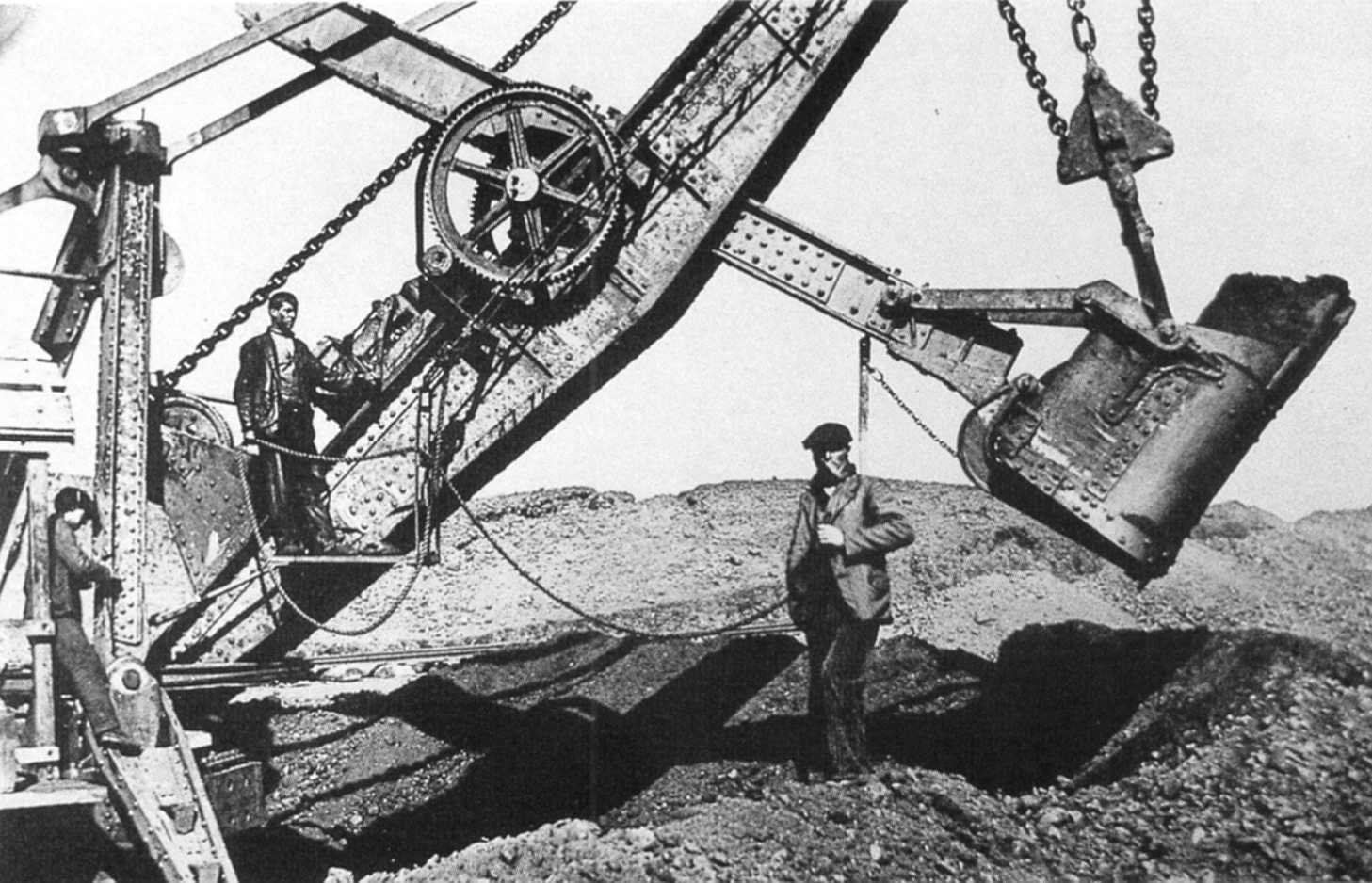 Excavación en Minas de Riotinto, 1873